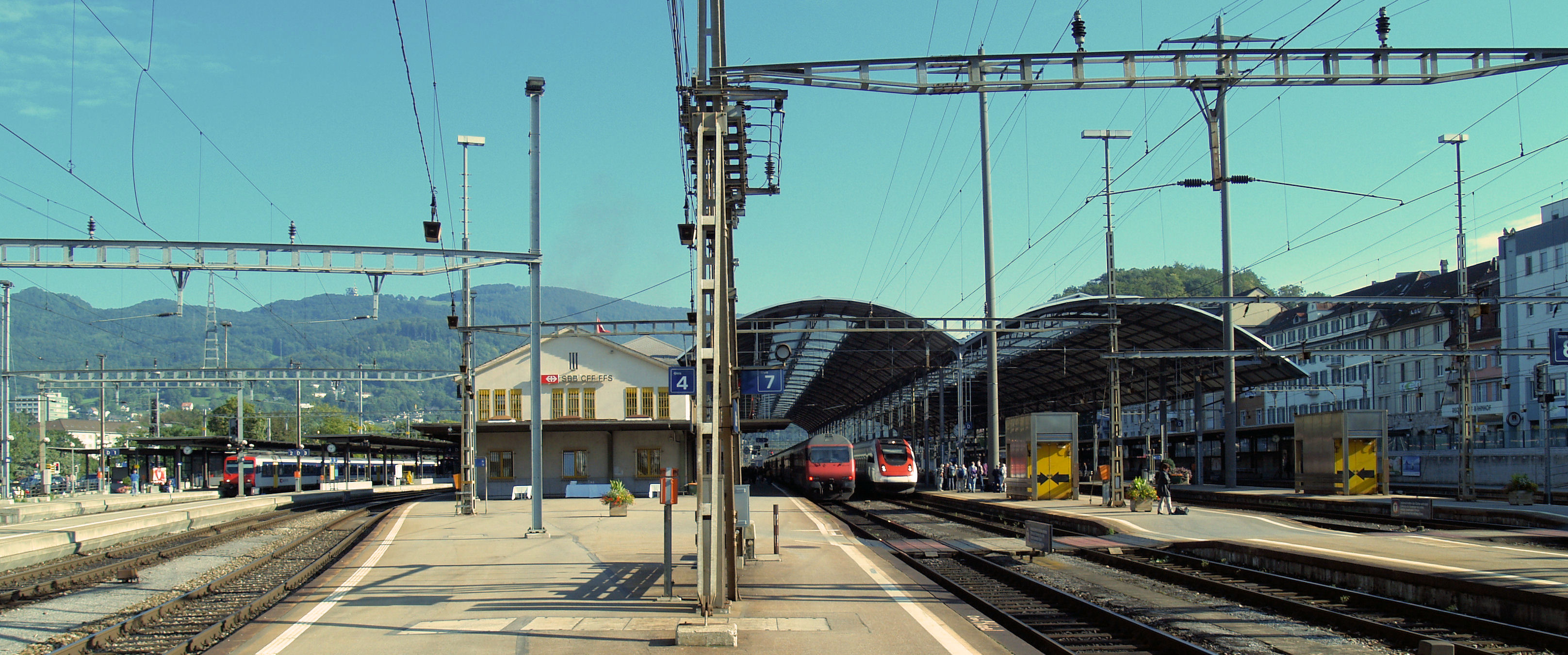 Sicht auf die Westseite des Bahnhof Olten (von links nach rechts Gleis 1-4 Westfassade Postgebäude Gleis 7-12)